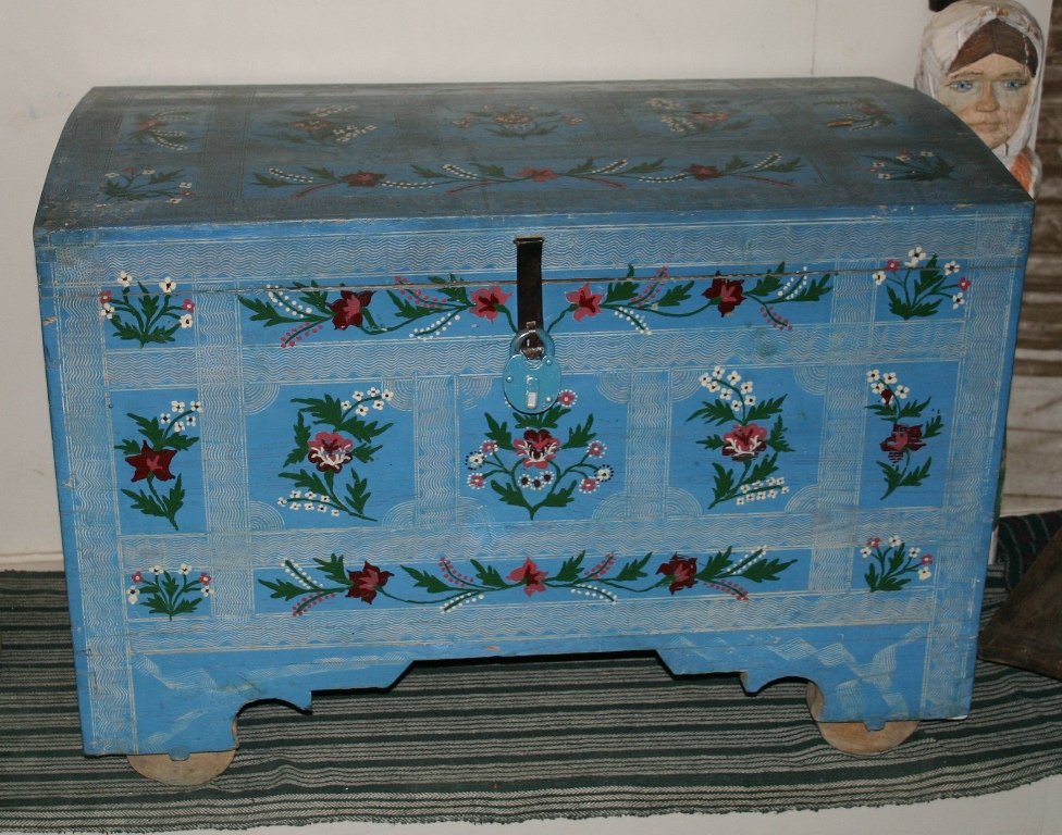 Old Belarusian History Museum Native nameМузей старажытнабеларускай культурыLocationMinsk, BelarusCoordinates53° 55′ 00″ N, 27° 36′ 10″ E Established1977Website control : Q6511262